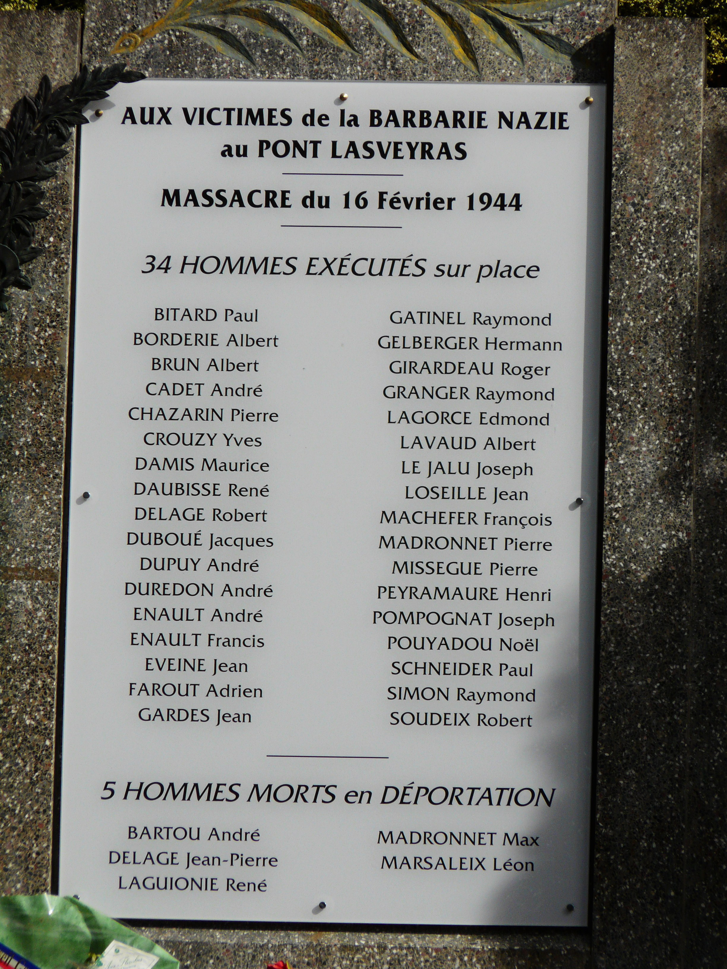 Détail du mémorial dédié au massacre des résistants du Pont Lasveyras, moulin de la Papeterie, Beyssenac, Corrèze, France